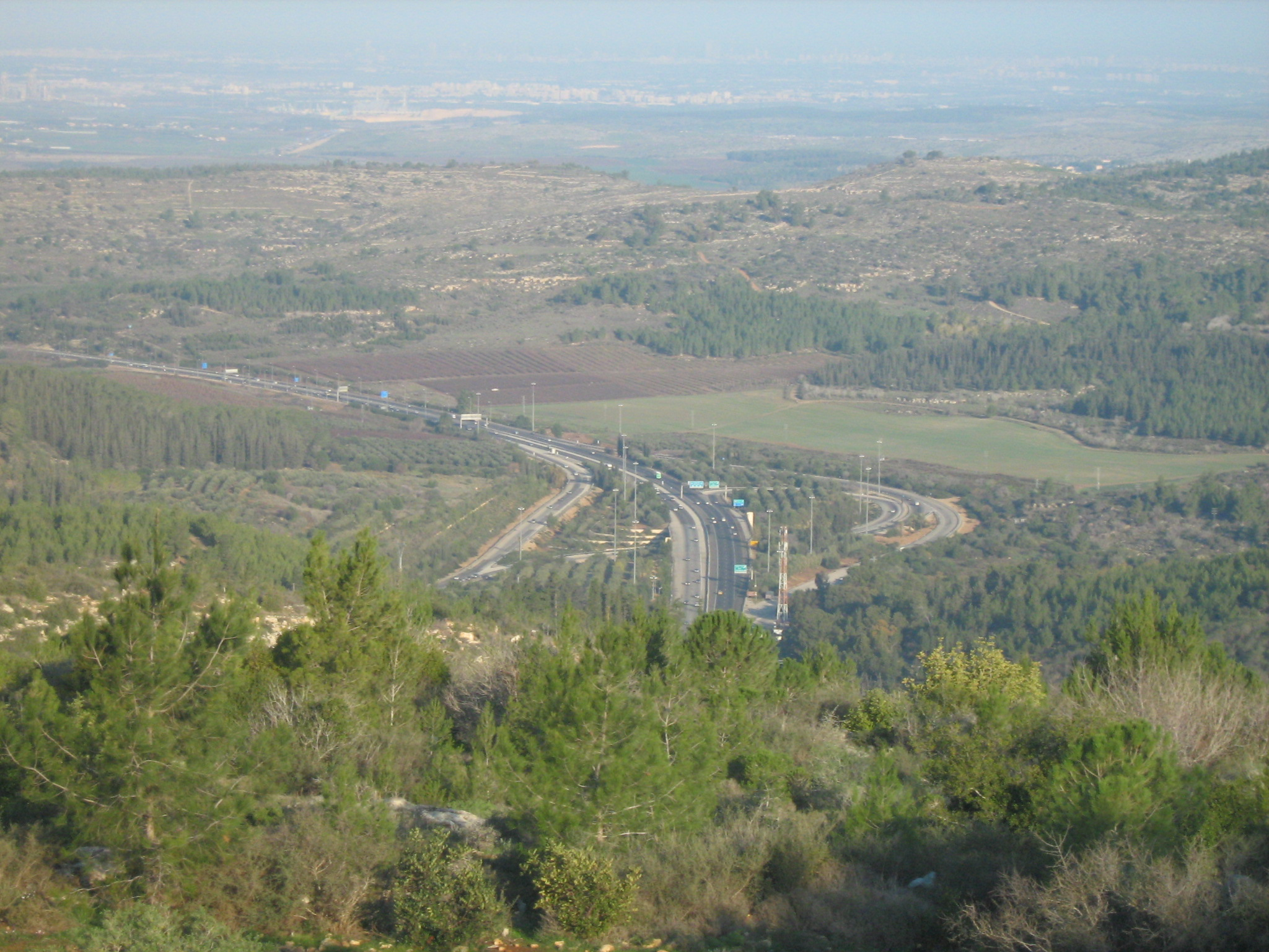 שילוט במחלף שער הגיא מכיוון כביש 38. במרחק רואים את העיר מודיעין